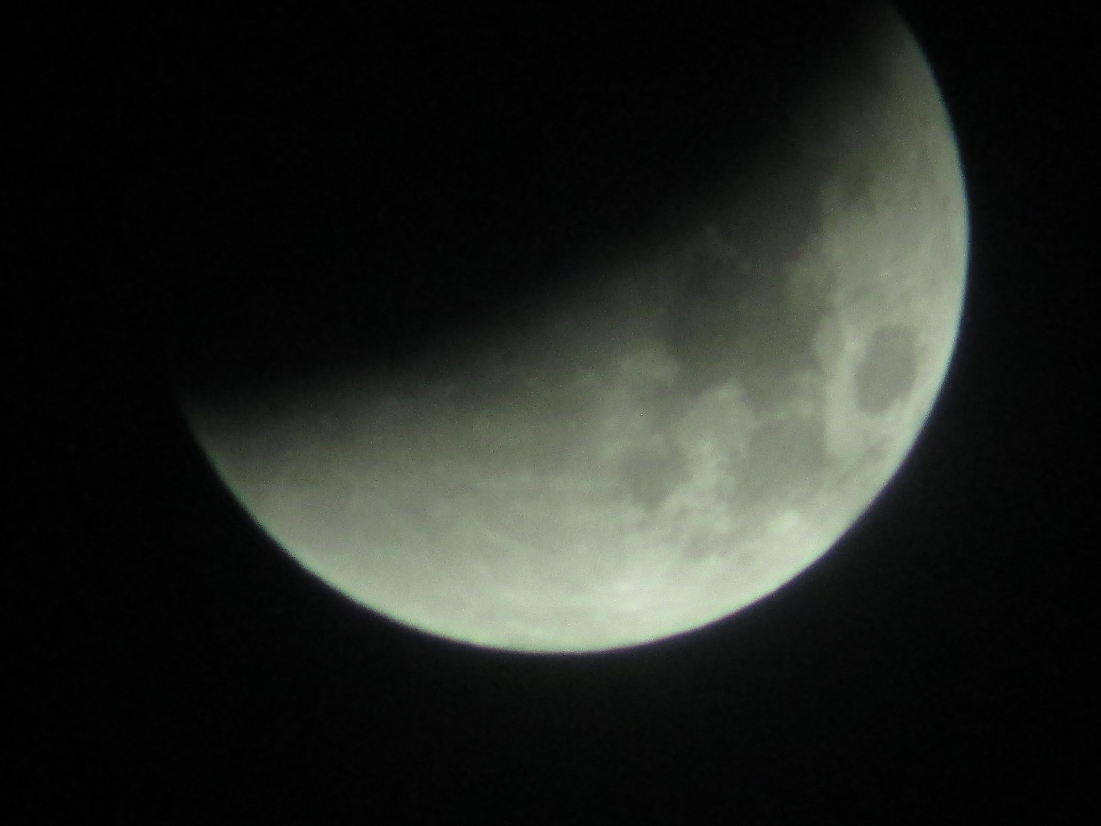 Photographie de l'éclipse totale de Lune du 28 septembre 2015, prise en Vendée à l'aide d'un APN accouplé à une jumelle.